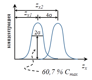 Пример хроматографического разделения на 4 сигма